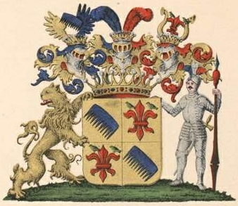 Anrep-Elmpti suguvõsa krahvivapp